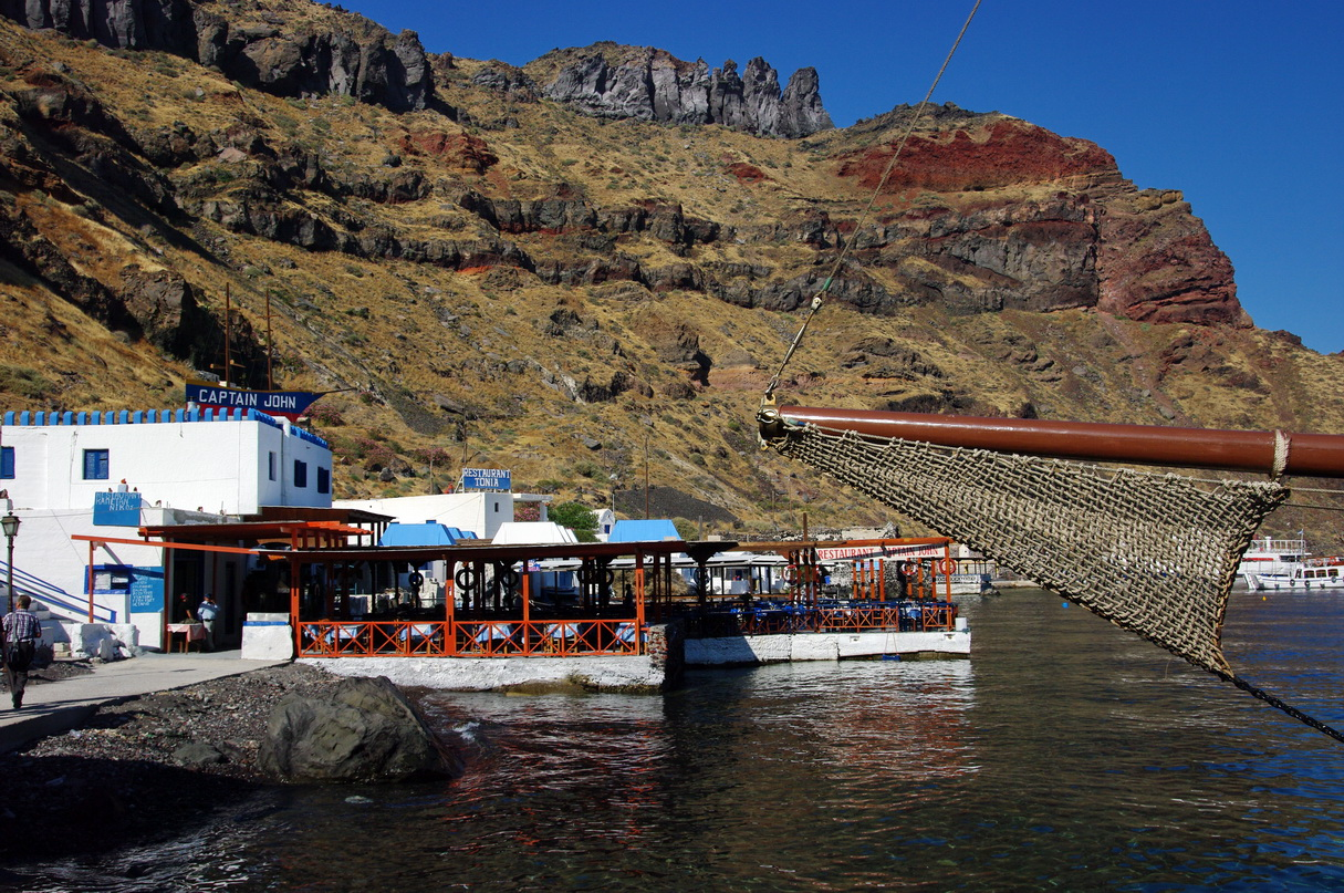 Im Hafen Korfos auf Thirasia